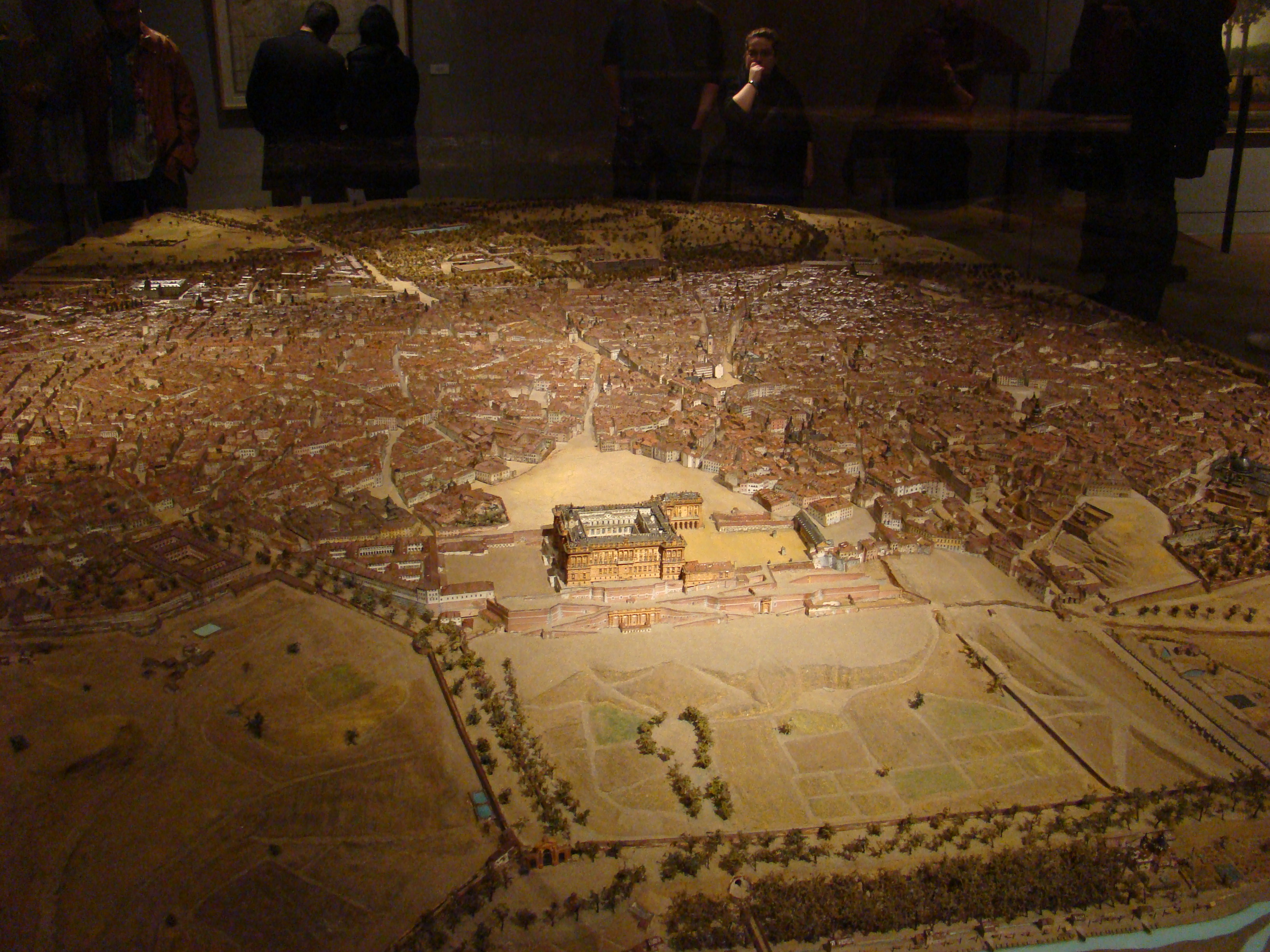 Maqueta de Madrid Gil de Palacio 1830